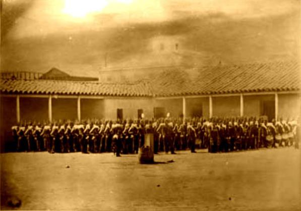 Fotos históricas de Valparaíso en Chile